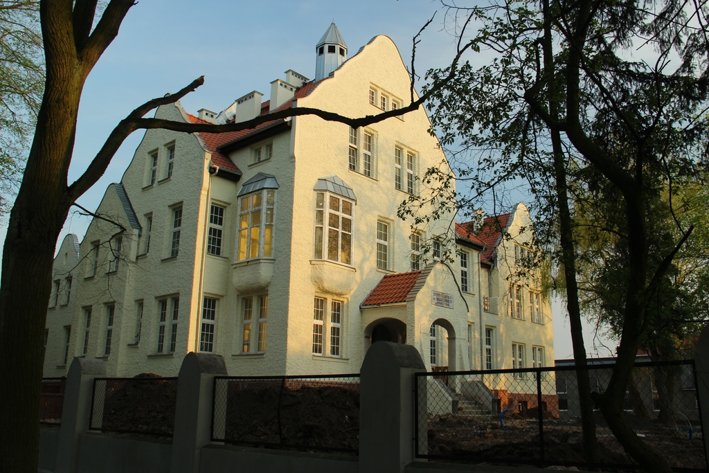 Działdowo, szpital, zespół szkoł medycznych, ob. Miejski Dom Kultury